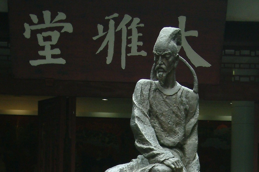 杜甫草堂 图片信息 本图片由Zerone拍摄于2004年7月25日； 使用富士胶片 S602 ZOOM数码相机。 作者已经授权将本图片置于公共领域。